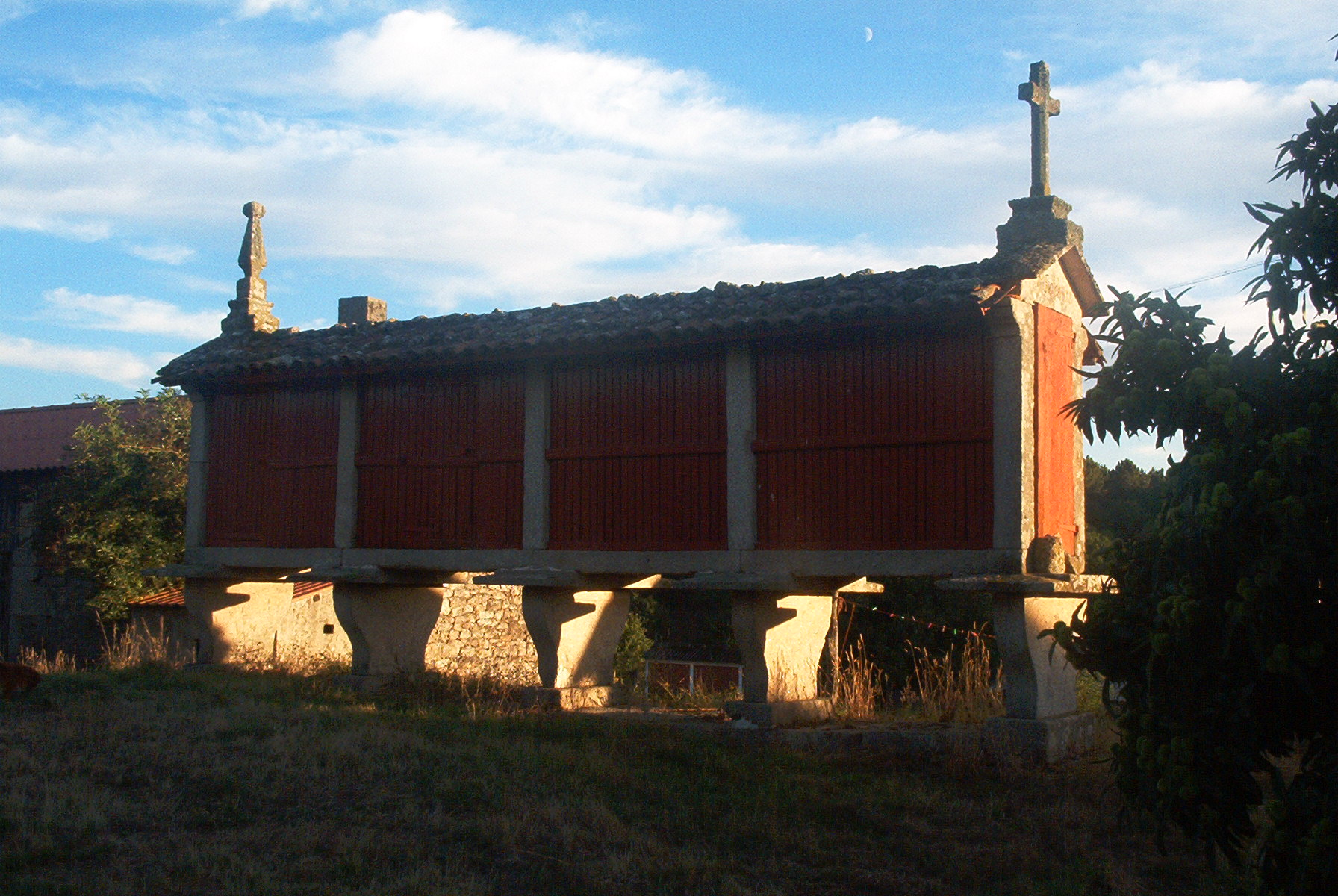 Hórreo en Quintela (Antas de Ulla)